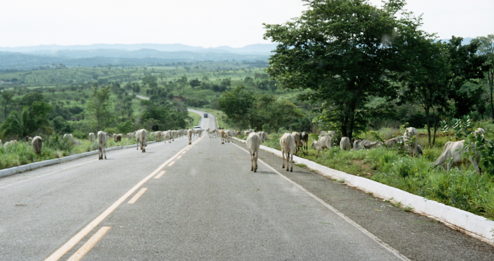 Brasilianische Staatsstraße BR-070 zwischen Jussara und Goiás Velho